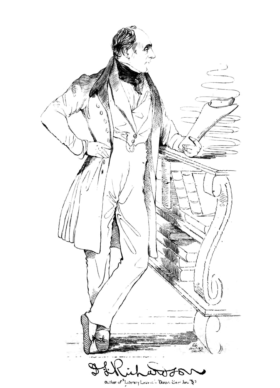 David Lester Richardson (1801 – 17 November 1865)